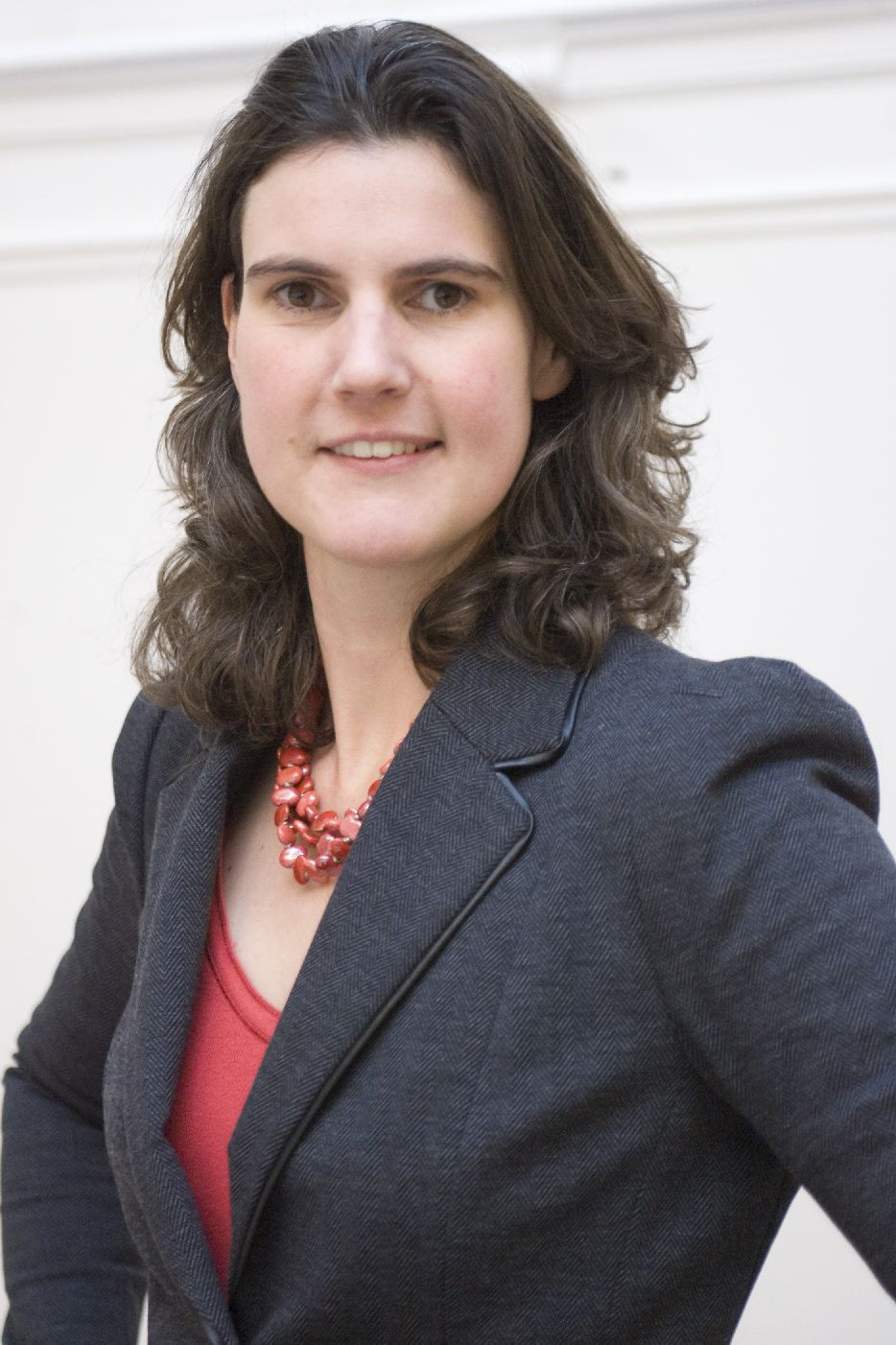 Heleen Weening in 2011